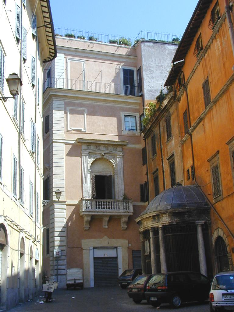 Roma, Ghetto: il tempietto del Carmelo a piazza Costaguti